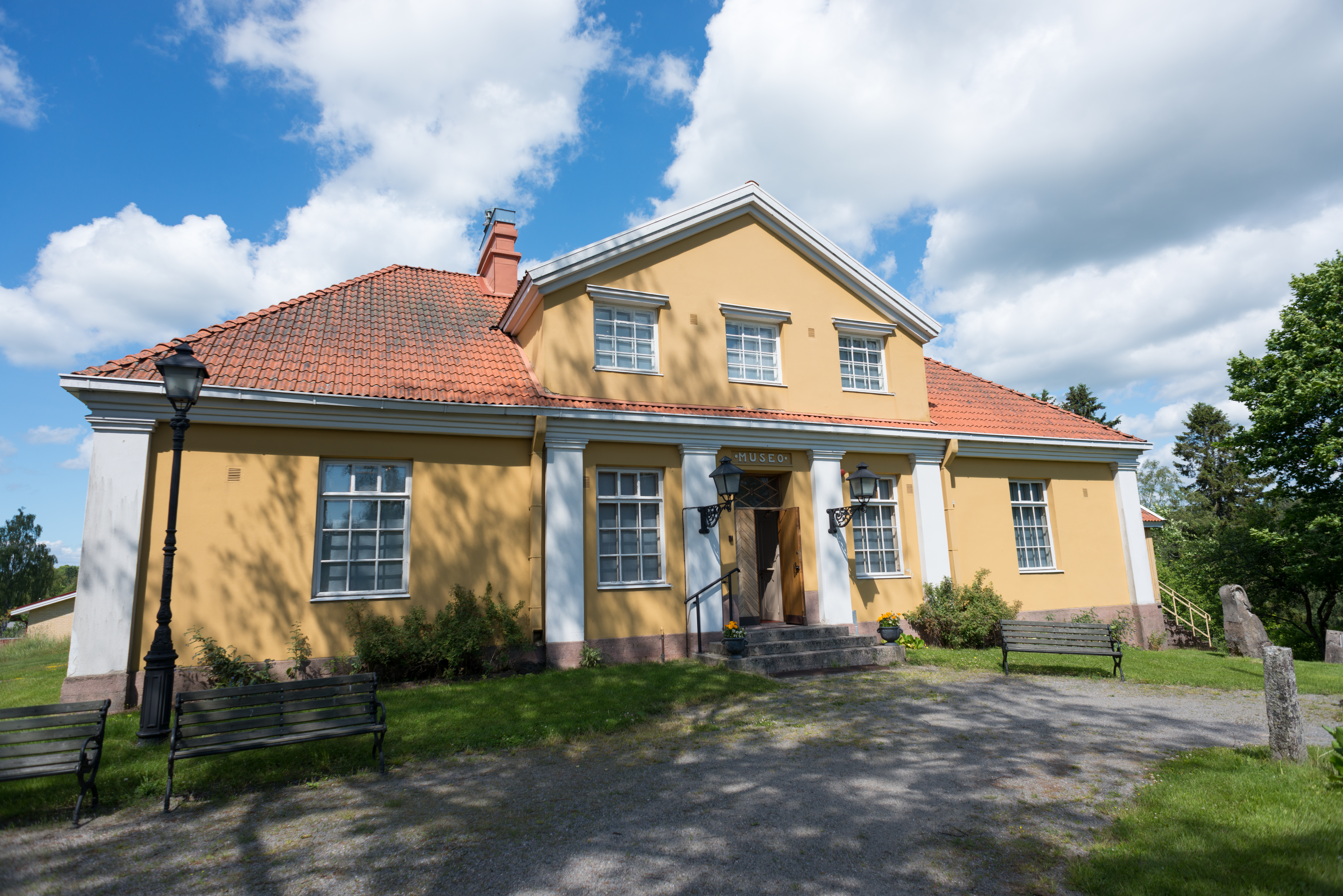 Perniön museo Perniössä